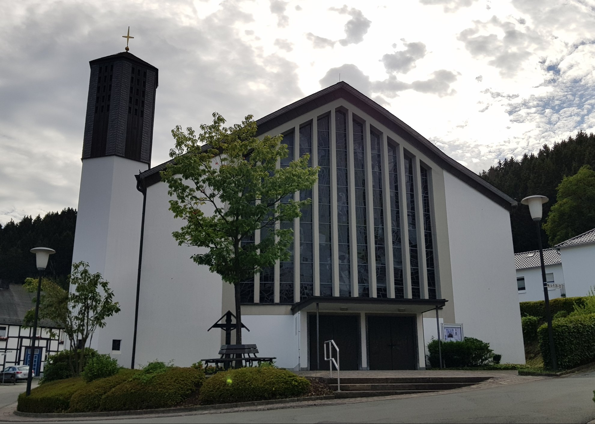 St. Nikolaus Kirche Heringhausen